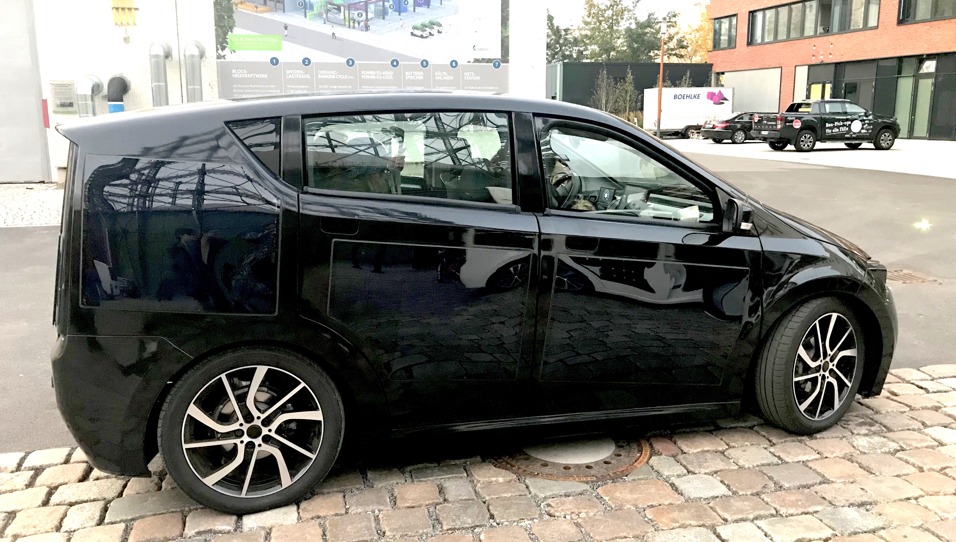 Sono Sion Seitenansicht bei Probefahrten in Berlin, an 13.10.2017